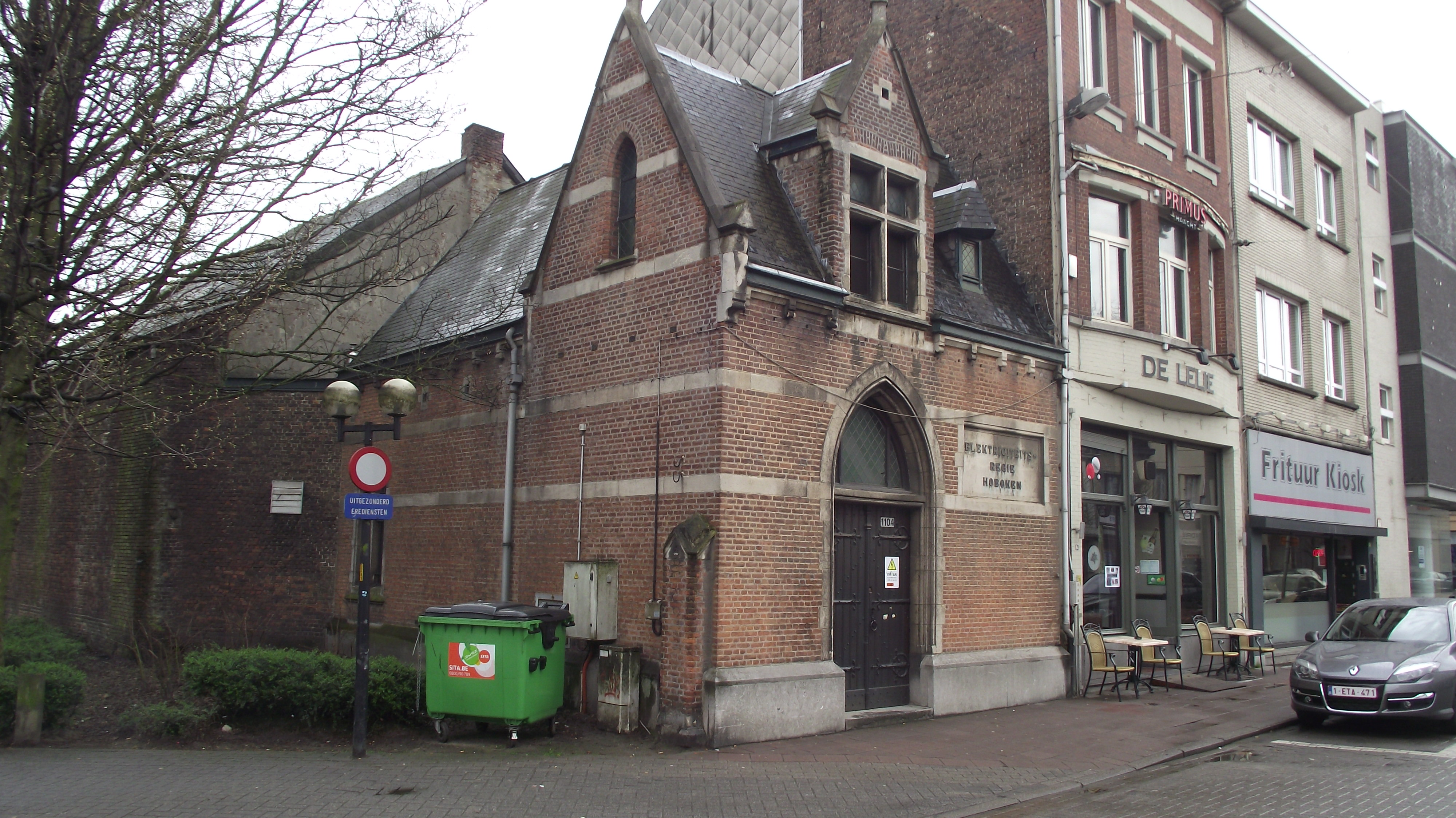 Hoboken elektriciteit centrale (Adres: 83 Kioskplaats, Antwerpen)